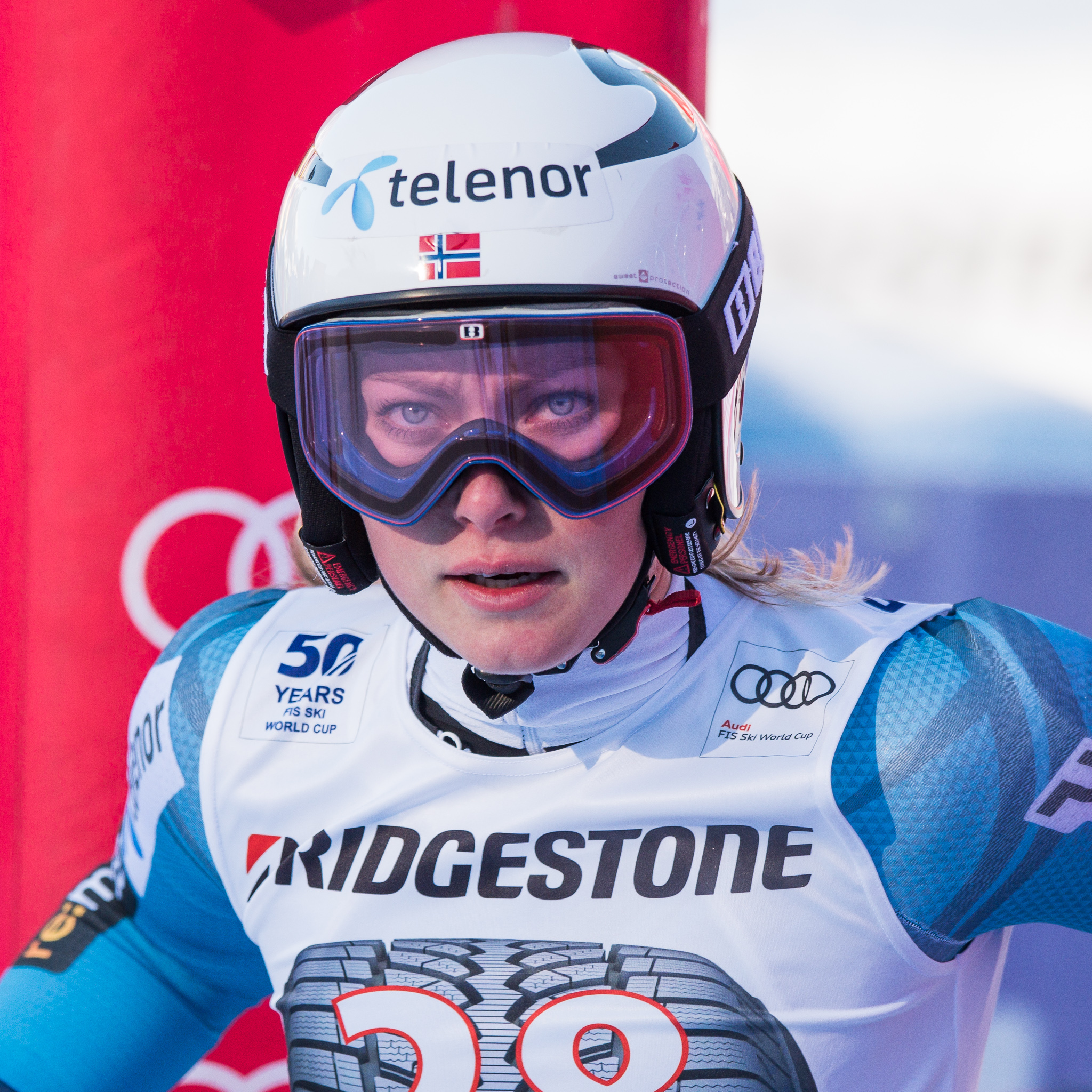 64. Kandahar Rennen,Audi FIS Ski Weltcup Garmisch-Partenkirchen,Damen Super-G,Kandahar,Ladies Super-G,Ragnhild Mowinckel